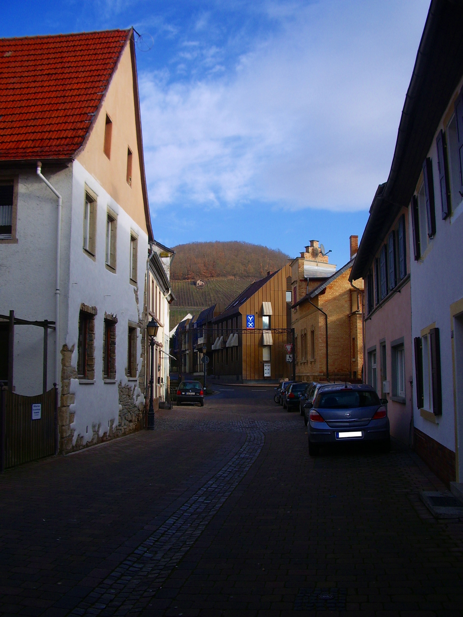 Die Wilhelmstraße ist die Hauptstraße von Obermoschel. Ehemals waren hier viele Geschäfte angesiedelt.